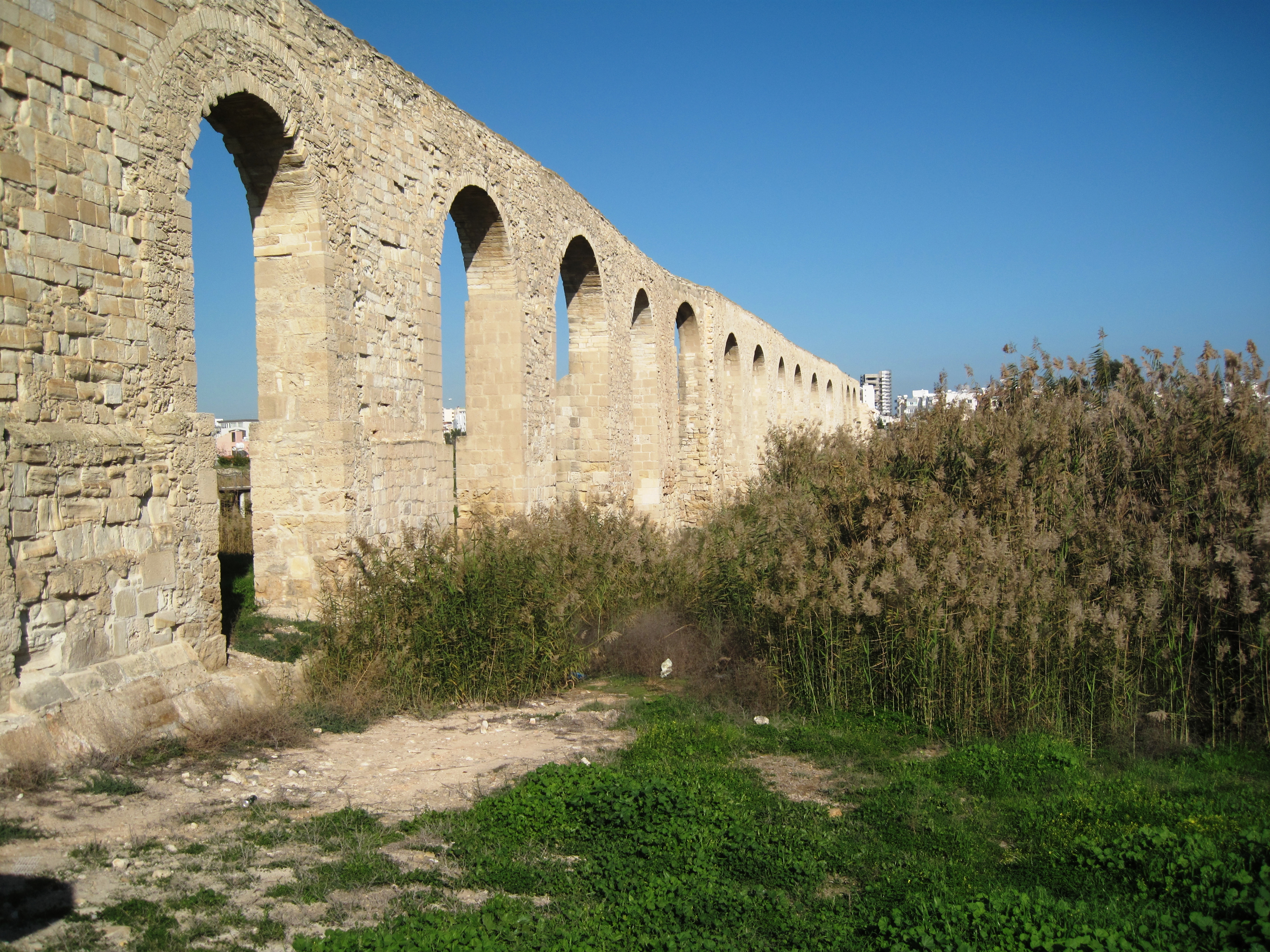 Cyprus - Larnaca Bekir Pasha Aqueduct